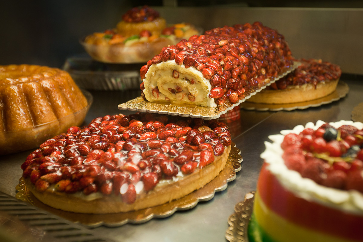 Fragola!